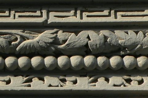 纹饰 拍摄